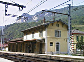 La Gare Saint Rambert en Bugey, région Rhône-Alpes, département de l'Ain, France